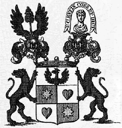 Wappen des Reichsfreiherrn Franz Xaver Florian von Ruffini 1769